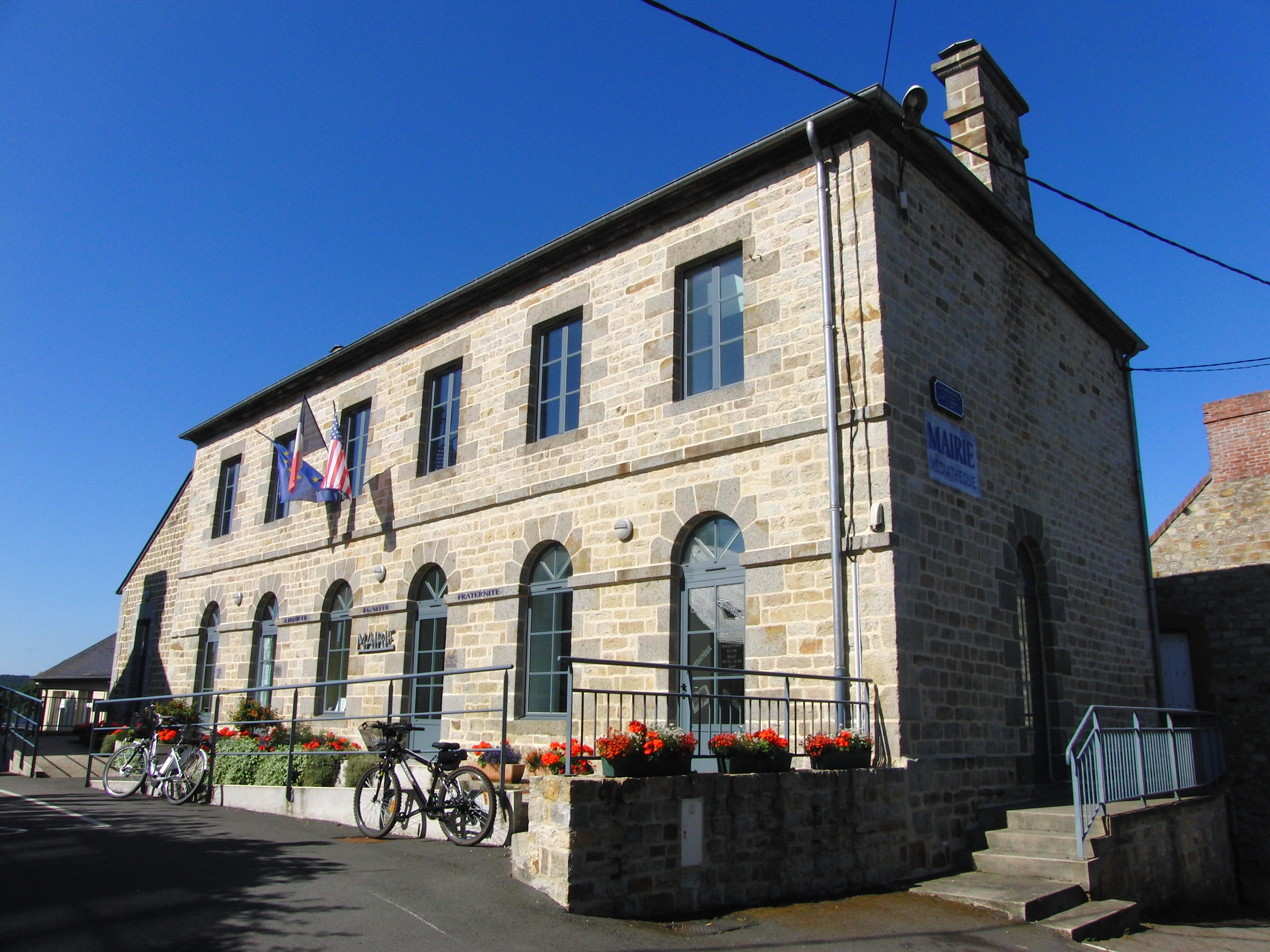 Mairie de Champsecret, Orne, France